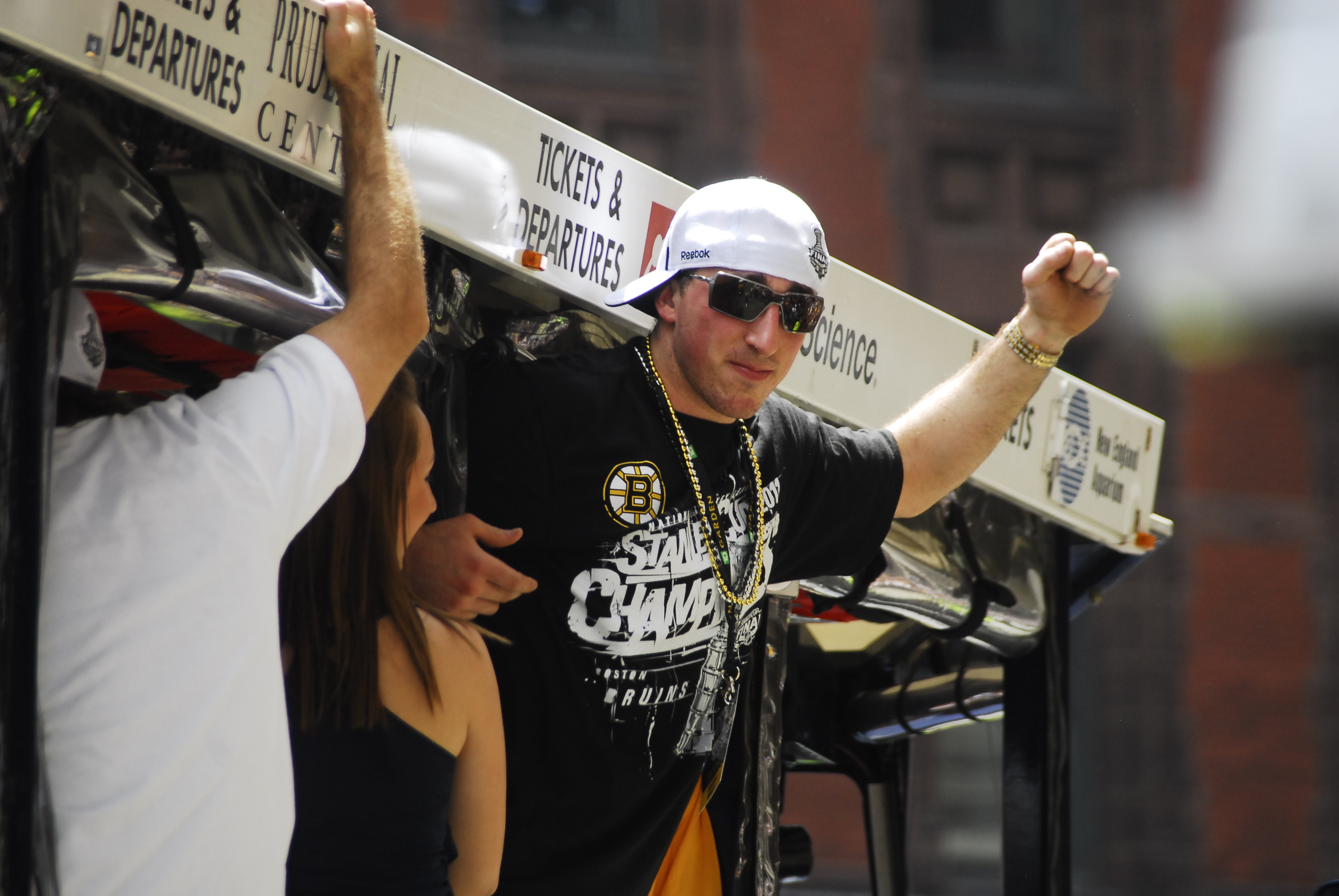 _ERI6505